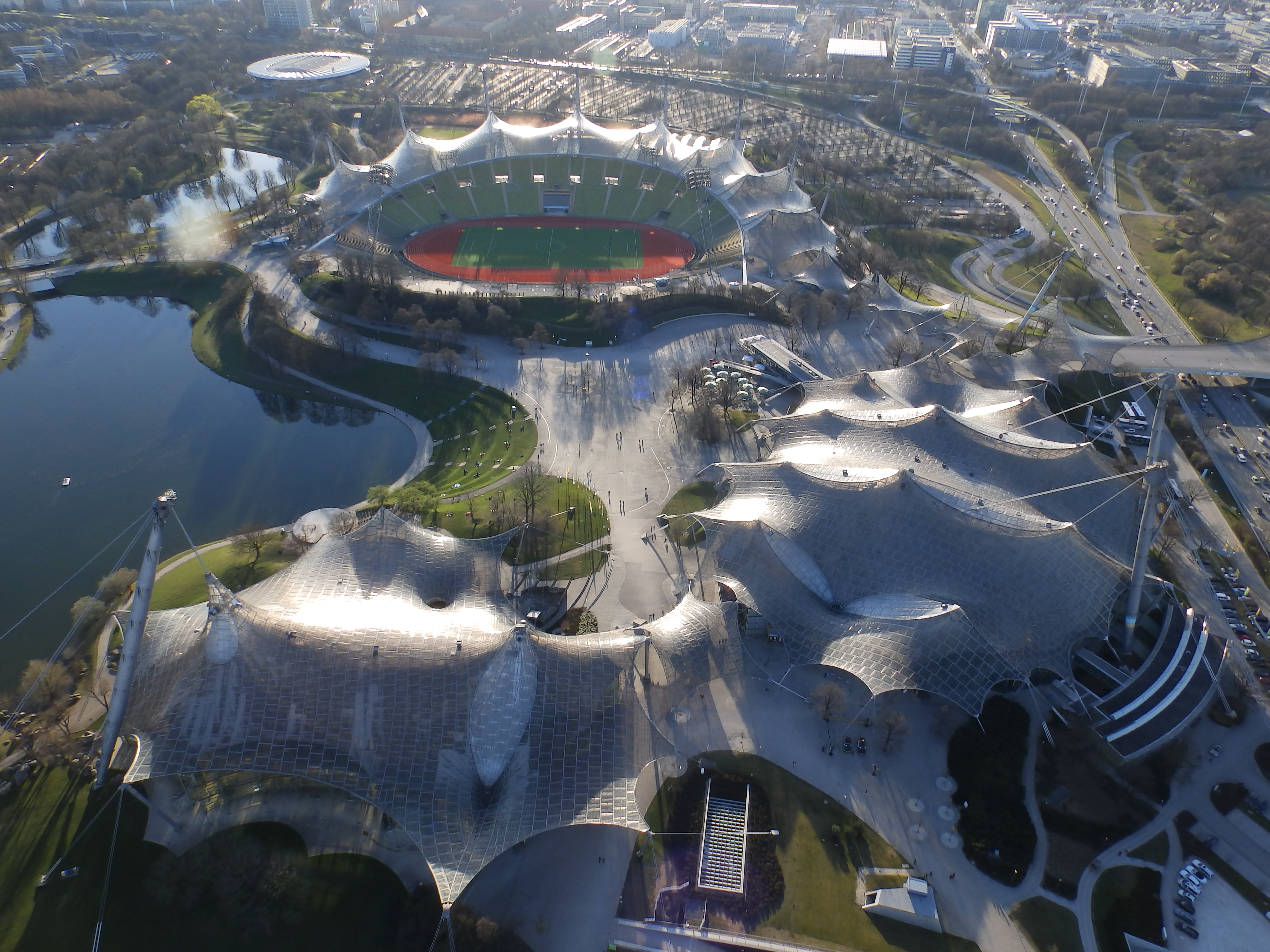 Die Zeltdachkonstruktion am Münchner Olympiapark